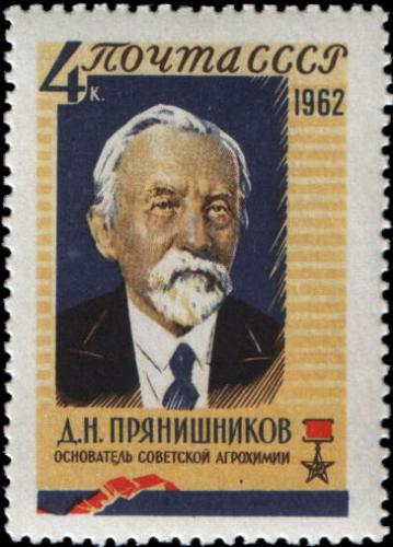 Почтовая марка СССР - Прянишников Дмитрий Николаевич, Герой Социалистического Труда